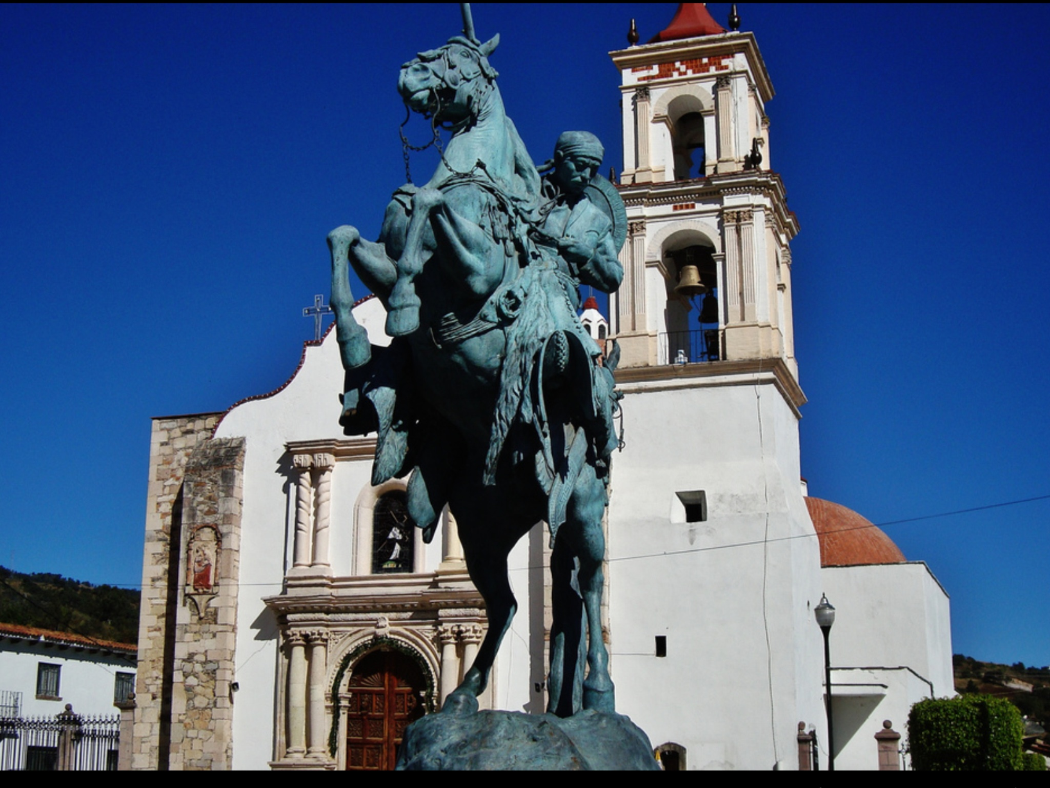 Obra de el Escultor Mexicano Martín Camilo Enriquez